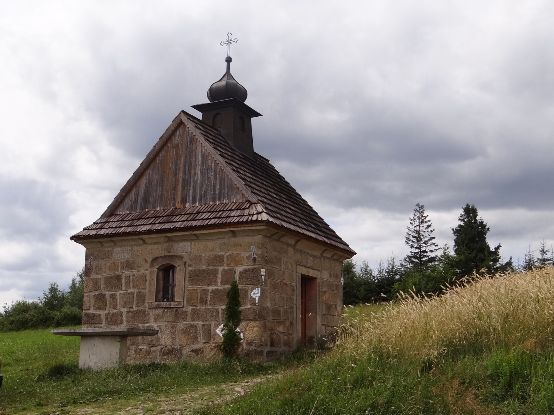 Kaplica pod Koskową Górą